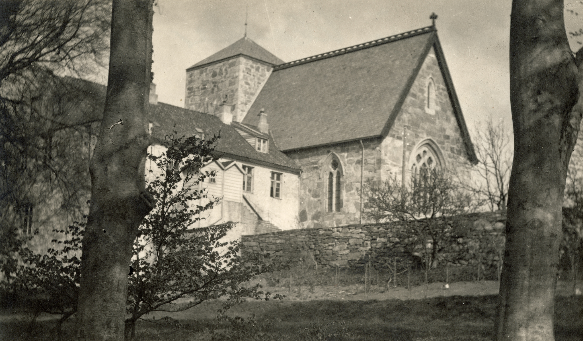 Utstein kloster Fotograf: Meyer, Johan (1860-1940) Datering: Sted: Mosterøy Rogaland Se flere bilder på Kulturminnebilder